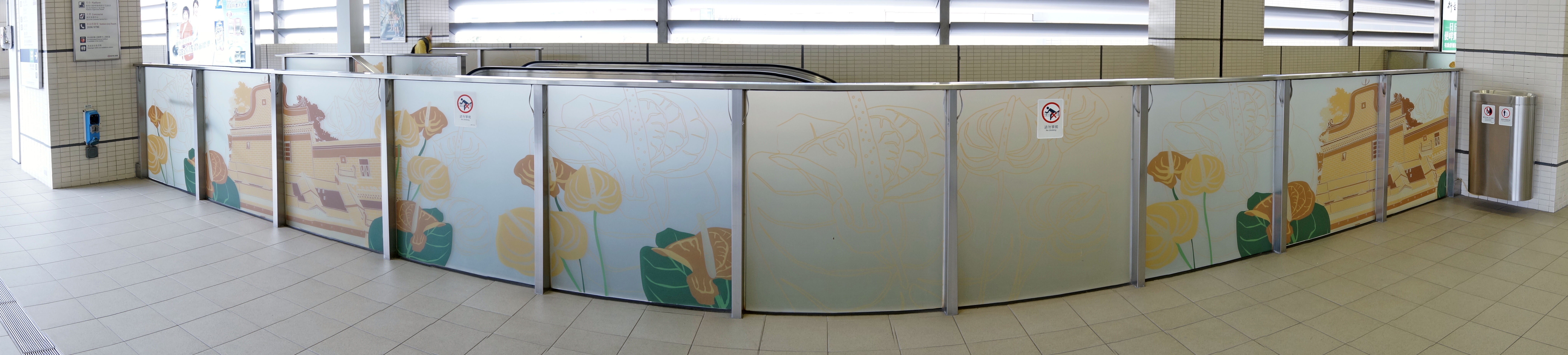 港鐵車公廟站月台佈置全景圖